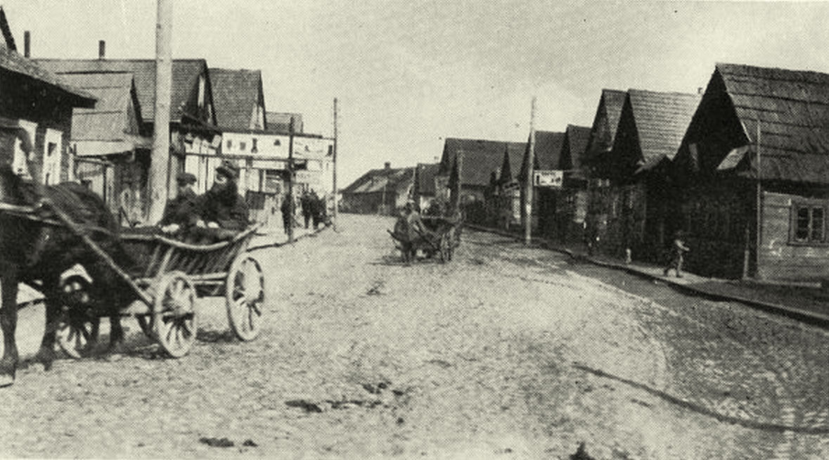 Беларуская (тарашкевіца): Клецак (Klecak), вуліца Віленская (vulica Vilenskaja)